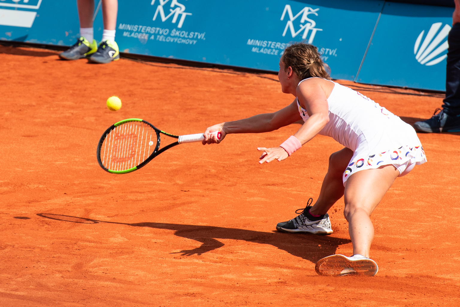 Barbora Strýcová